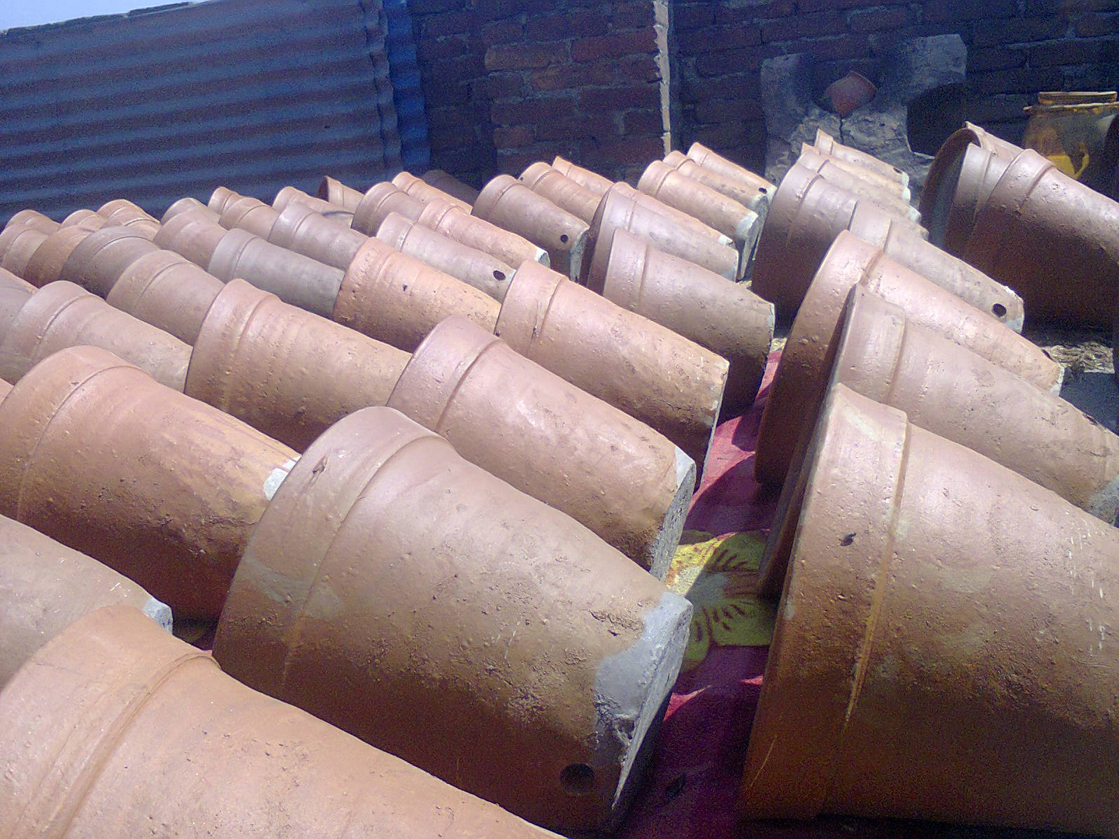 नेपाली: माटोको गमला घाममा सुकाउन राखेको